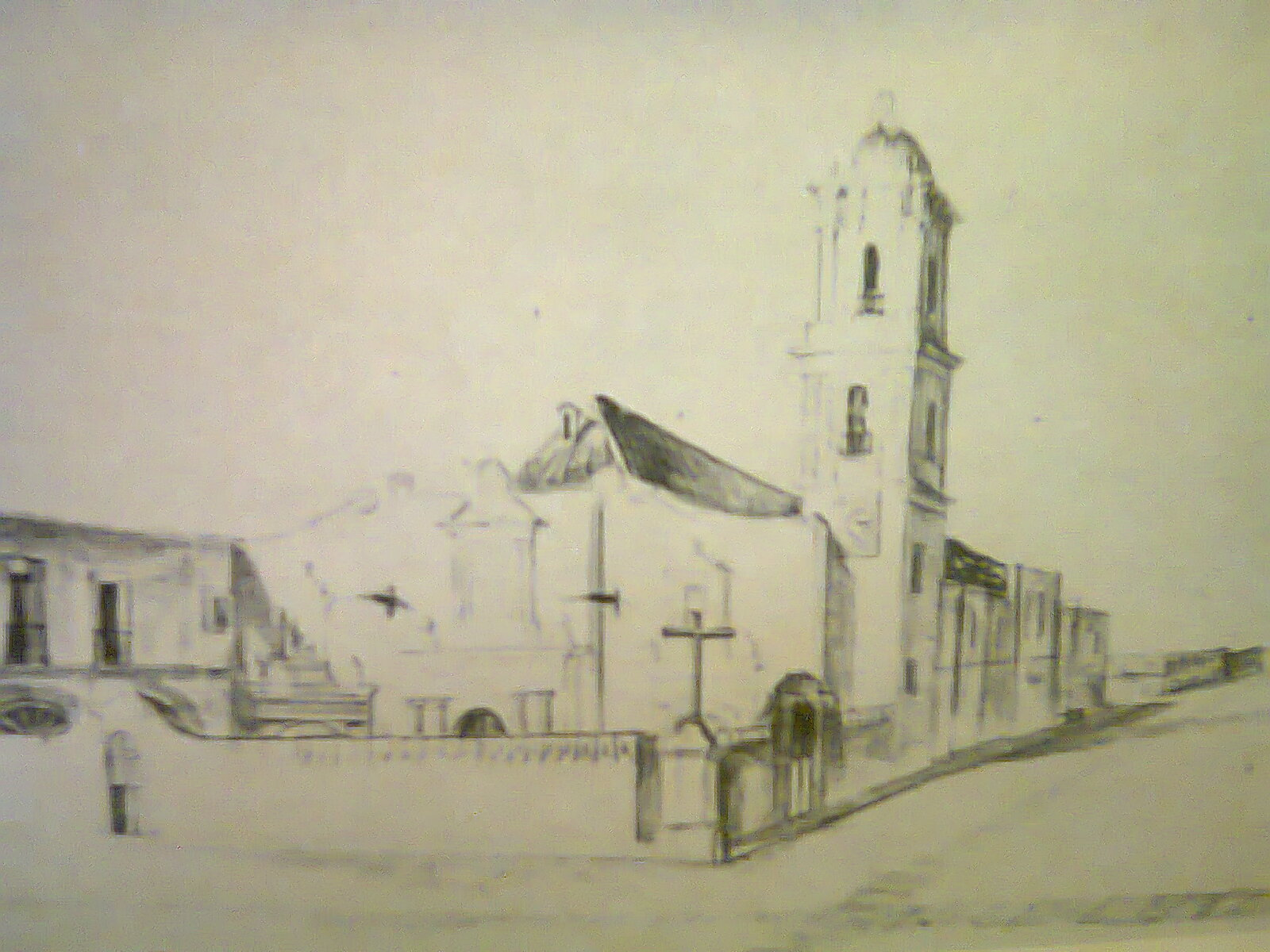 Acuarela del antiguo templo de la Merced en la Ciudad de Mexico, uno de los pocos testimonios de su aspecto